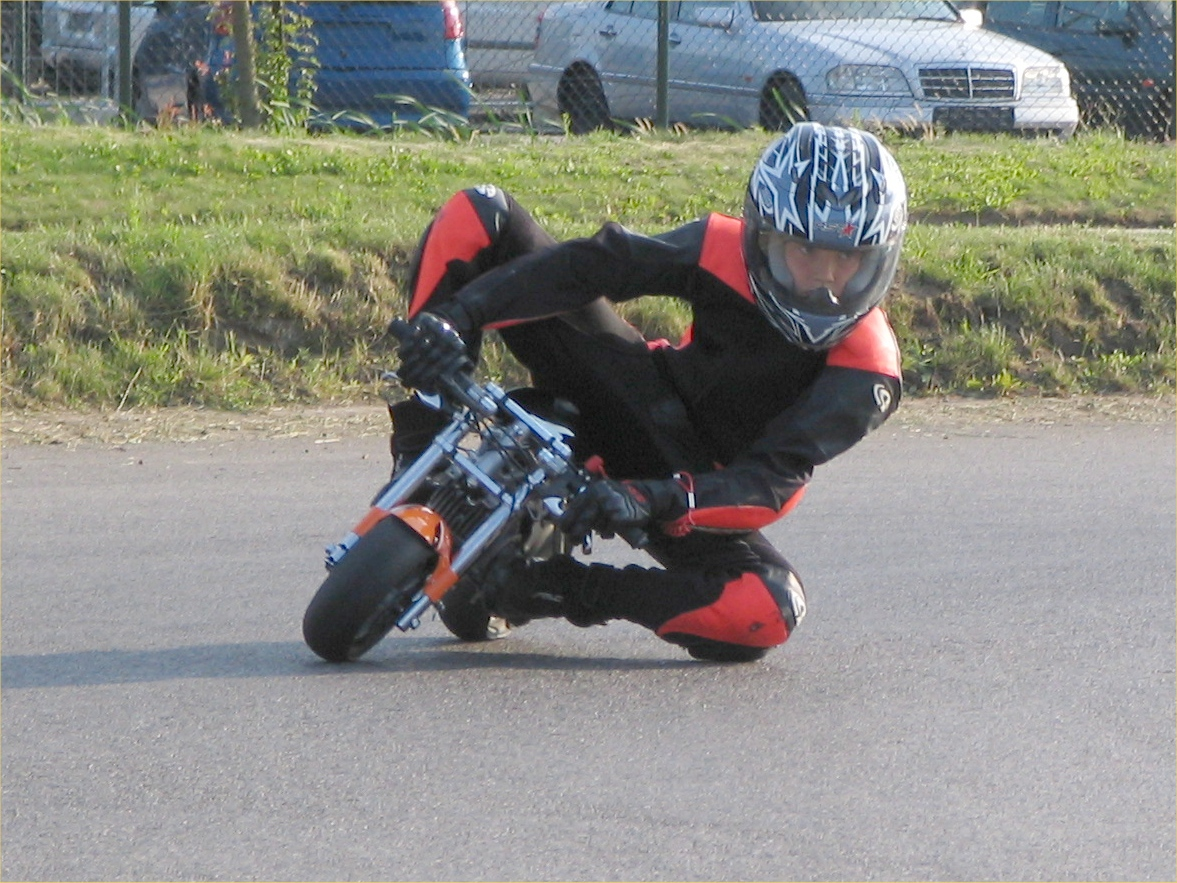 Ivar Schoots (12yr) training at Wilrijk (B)